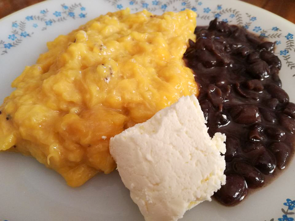 Mogo o machuco de plátano con frijoles y queso.